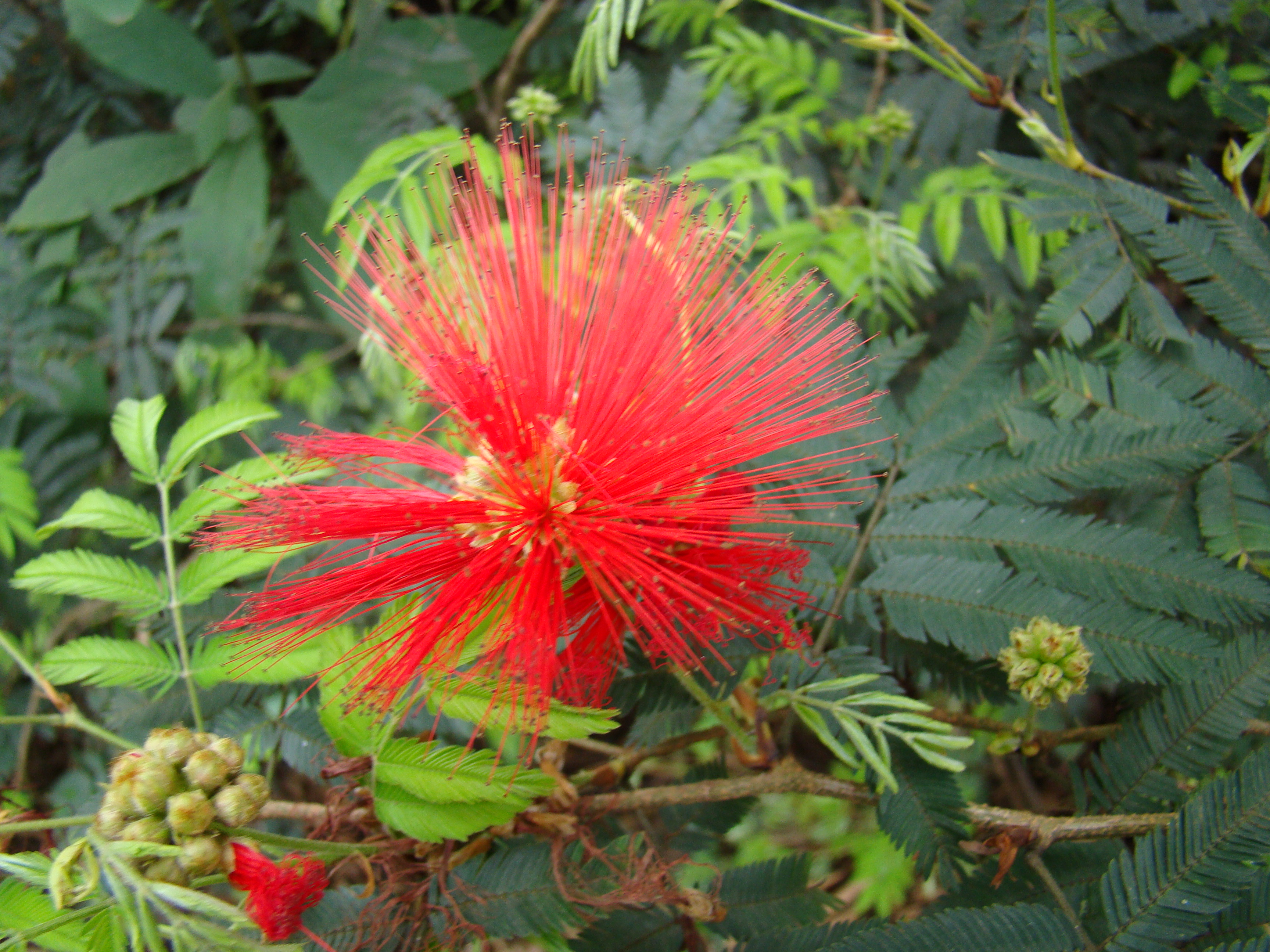 Park Ceret S�o paulo Brazil